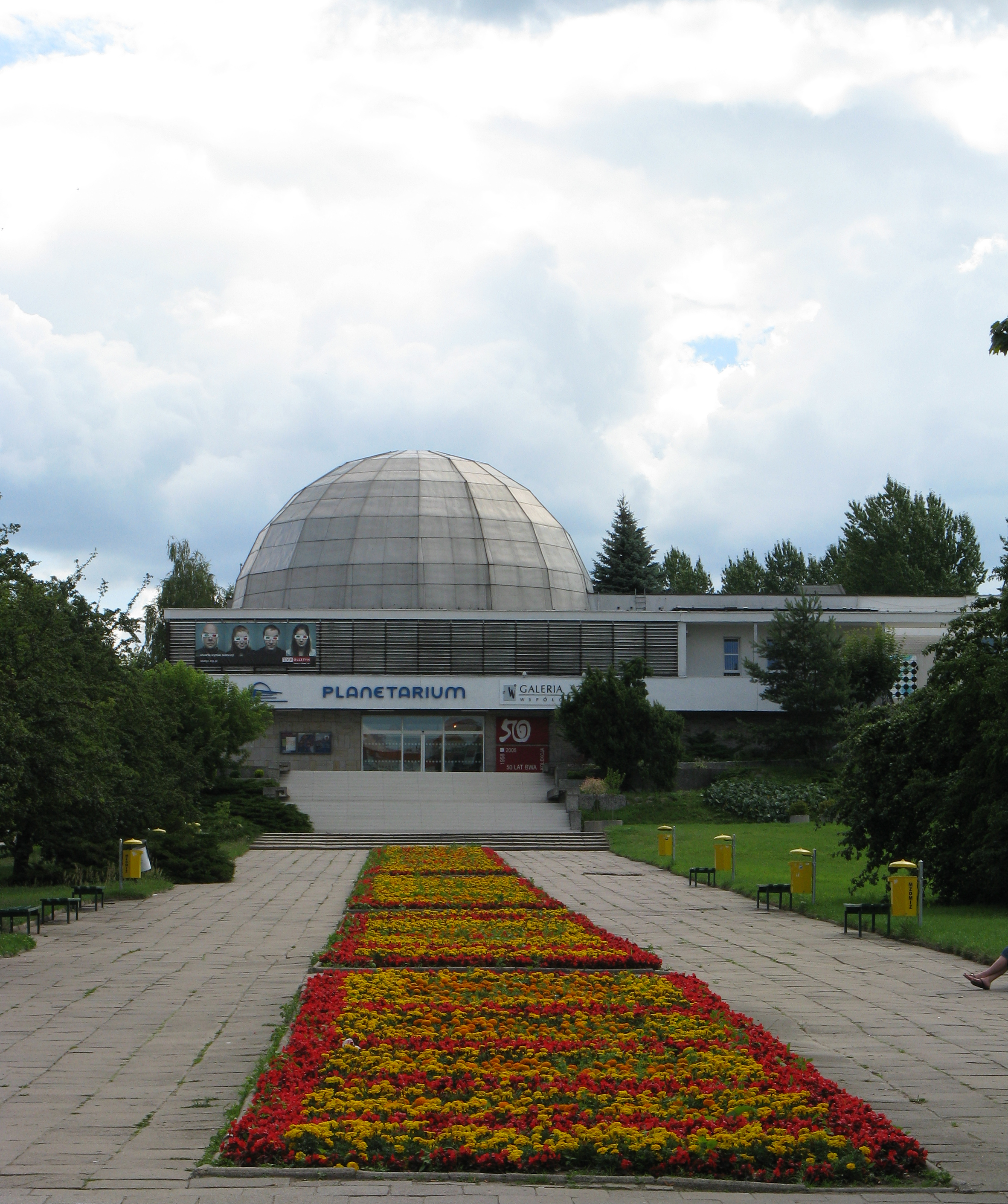 Planetarium w Olsztynie